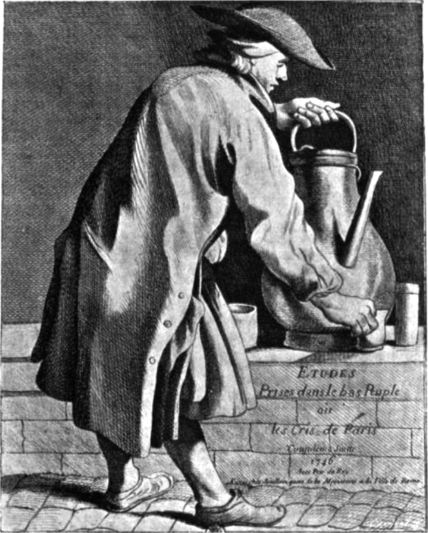 A Coffee Peddler